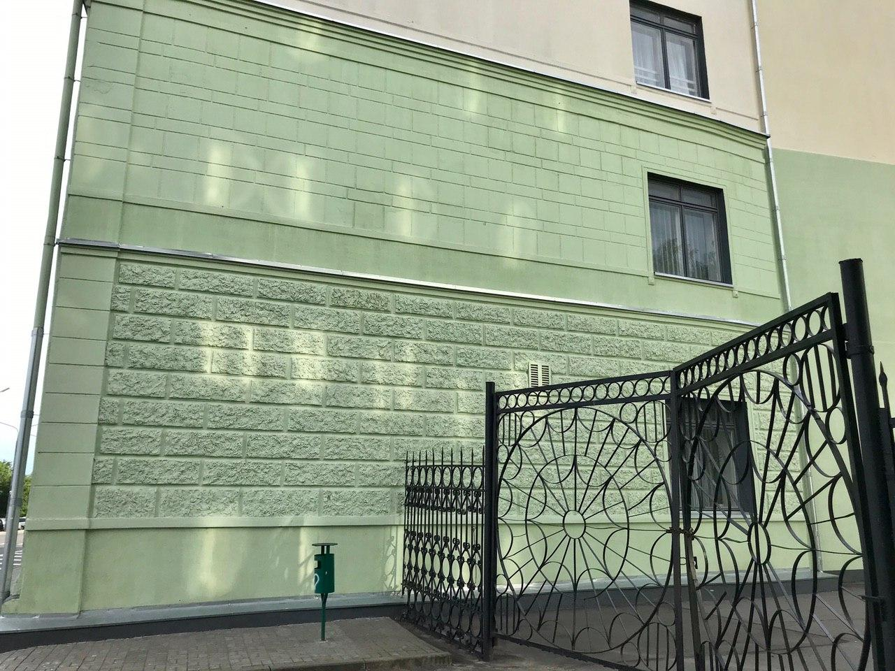 Магілёў. Былы будынак рэальнага вучылішча